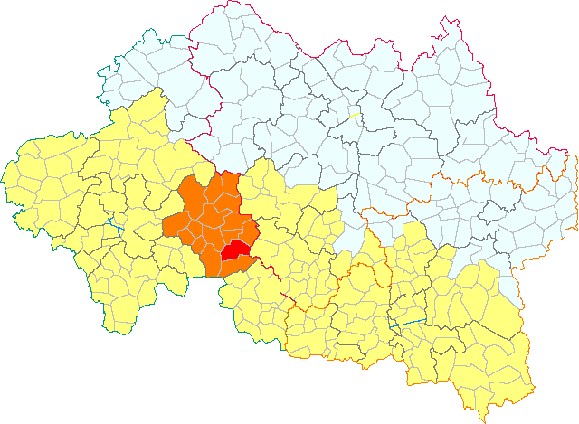 Blomart dins lo canton de Montmaraud